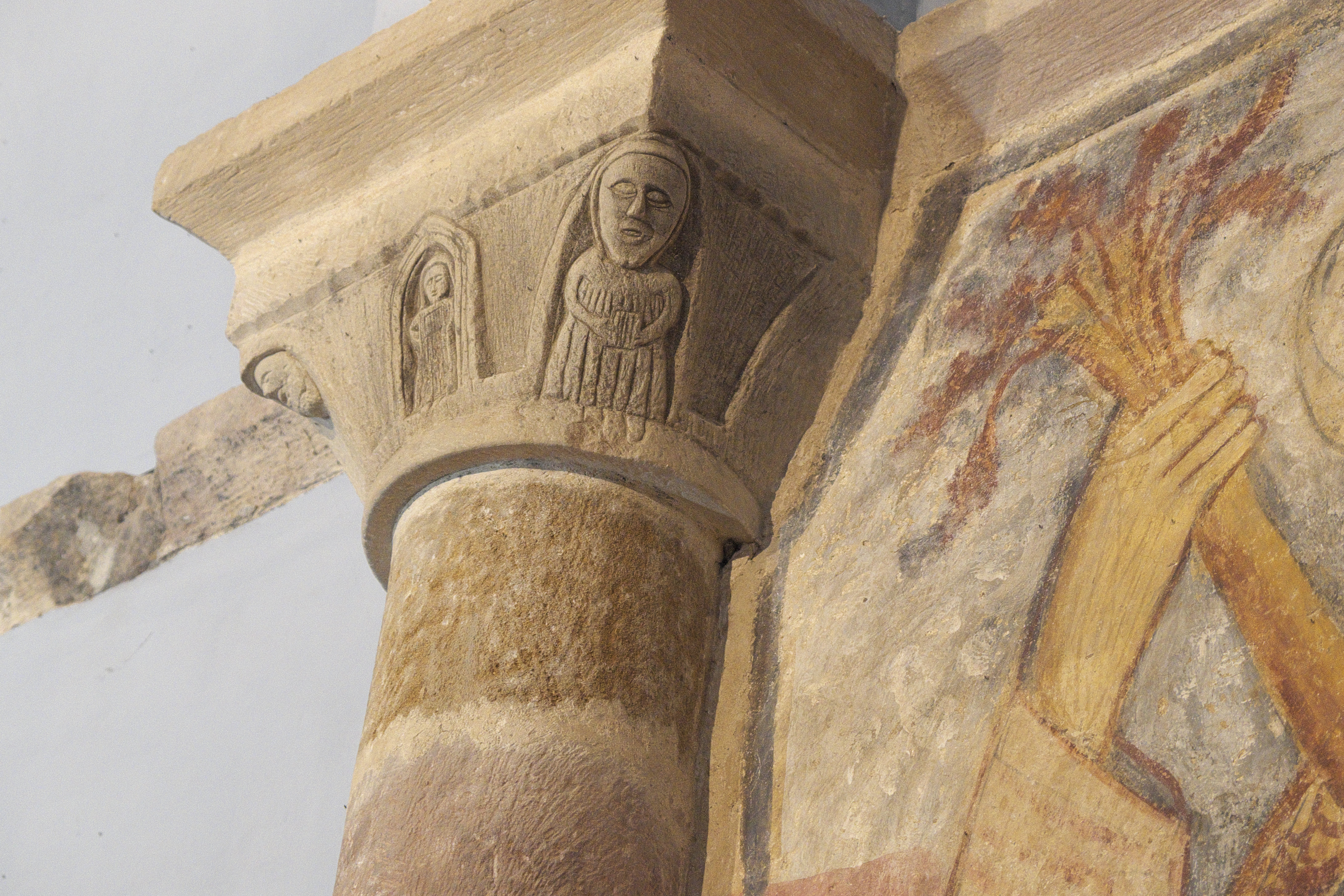 Kirche San Cornelio y San Cipriano in San Cebrián de Mudá in der Provinz Palencia (Kastilien-León/Spanien), Kapitell